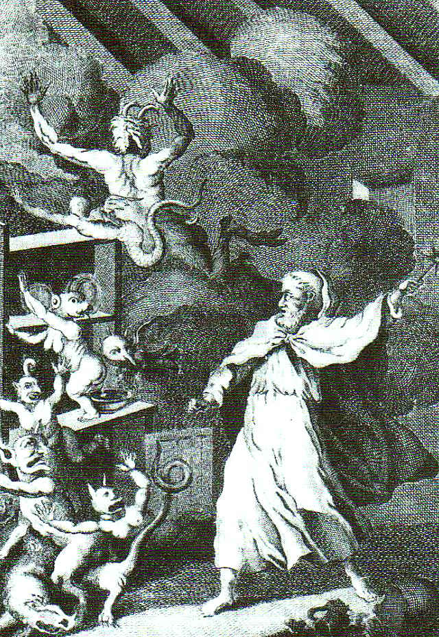 Juan de Cordoba chassant les démons